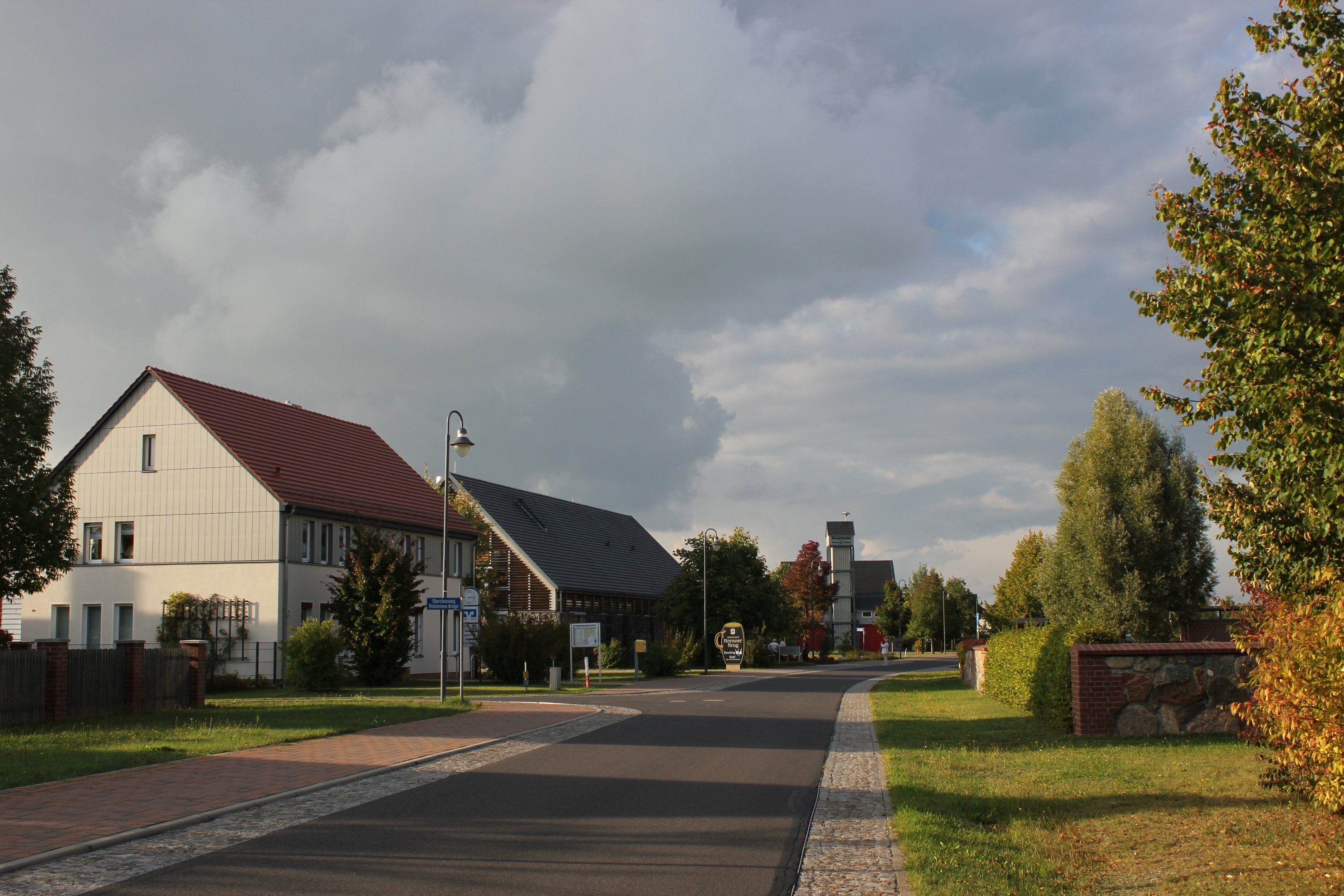 Hornjoserbsce: Wjesna dróha w Nowym Rogowje.